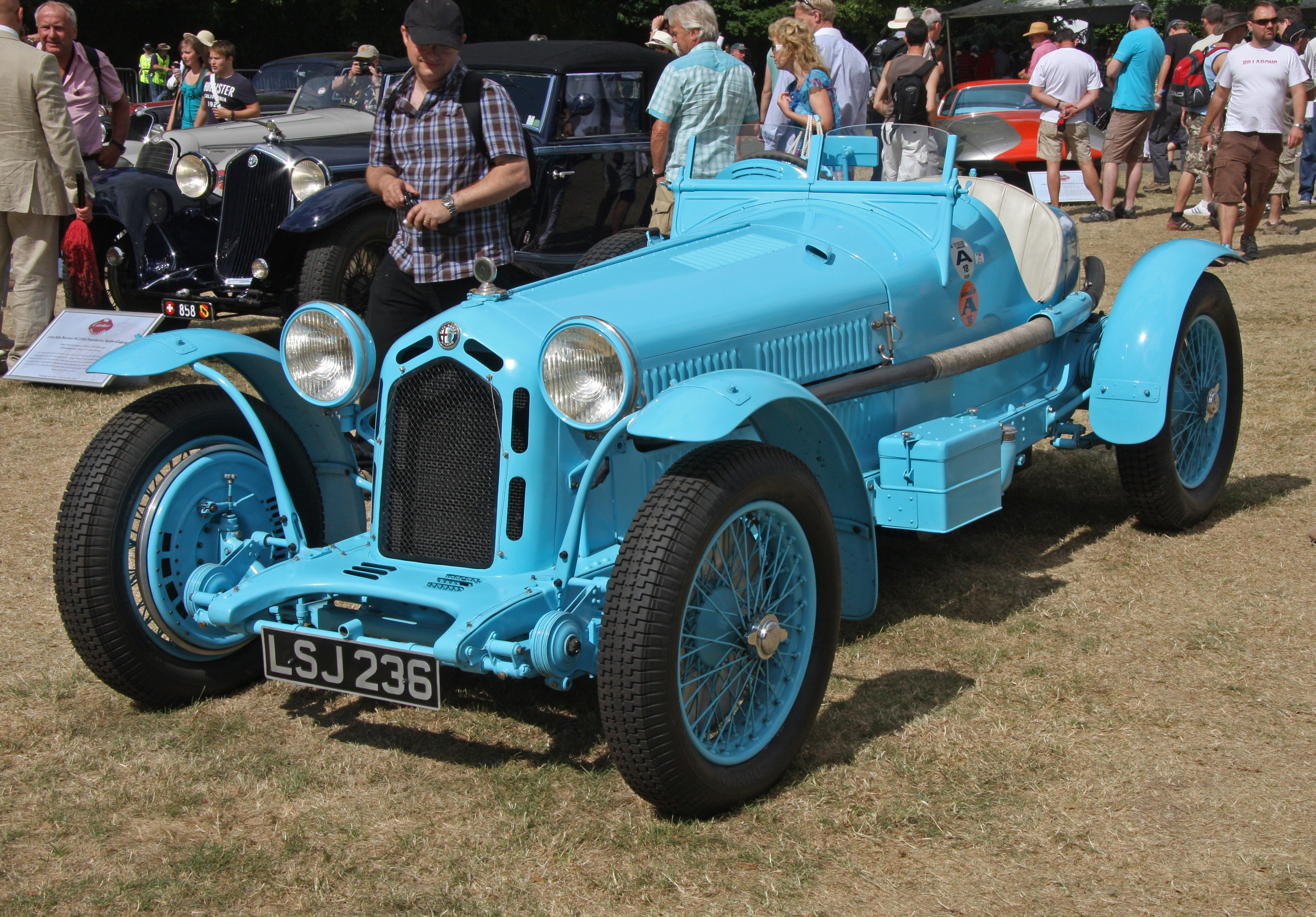 1933 Alfa Romeo 8C 2300 Monza